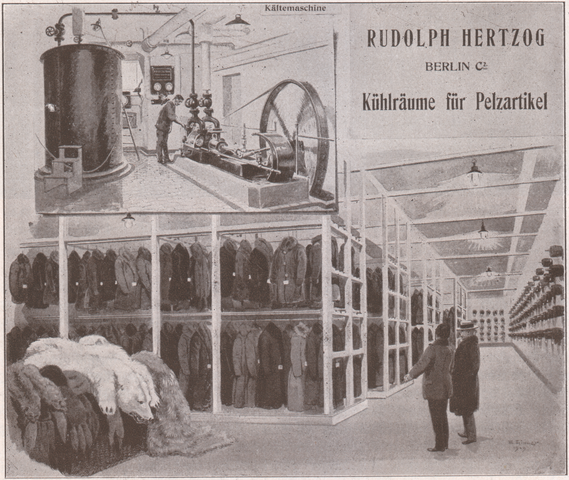 Rudolph Hertzog, Agenda 1914. Jahreskalender des Berliner Kaufhauses. Seite 86. Bildunterschrift: Rudolph Hertzog: Kühlräume für Pelzartikel. Zur Konservierung von Pelzwaren im Sommer steht eine Eismaschinenanlage für die Kühlhaltung der im Keller befindlichen Aufbewahrungsräume zur Verfügung, da die neuesten Forschungen ergeben haben, daß die Motte bei einer Kälte von 2 Grad unter Null nicht mehr lebensfähig ist. Um die Kundschaft an dem Vorteil dieser Errungenschaft teilnehmen zu lassen, sind die Kühlräume nach den neuesten Erfahrungen eingerichtet und bei der starken Inanspruchnahme seitens des Publikums bedeutend vergrößert worden. Leinen, 19,5 x 28,5 cm